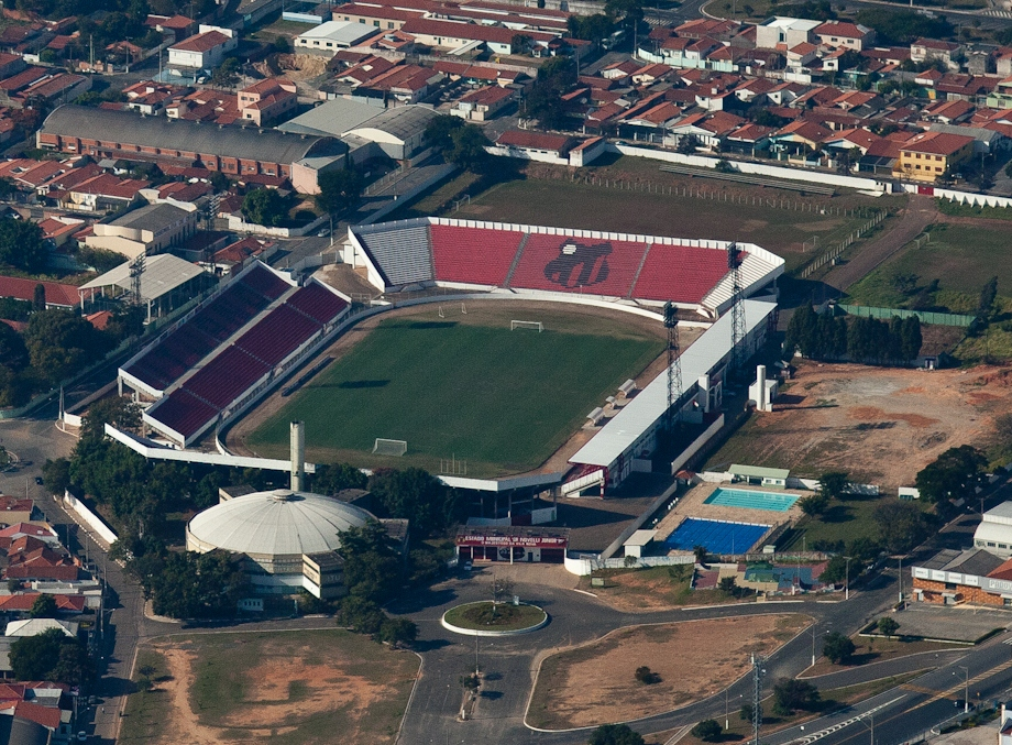 O Estádio Municipal Doutor Novelli Júnior, ou simplesmente Novelli Júnior, é um estádio de futebol localizado na cidade de Itu, no estado de São Paulo, é a casa do Ituano Futebol Clube.